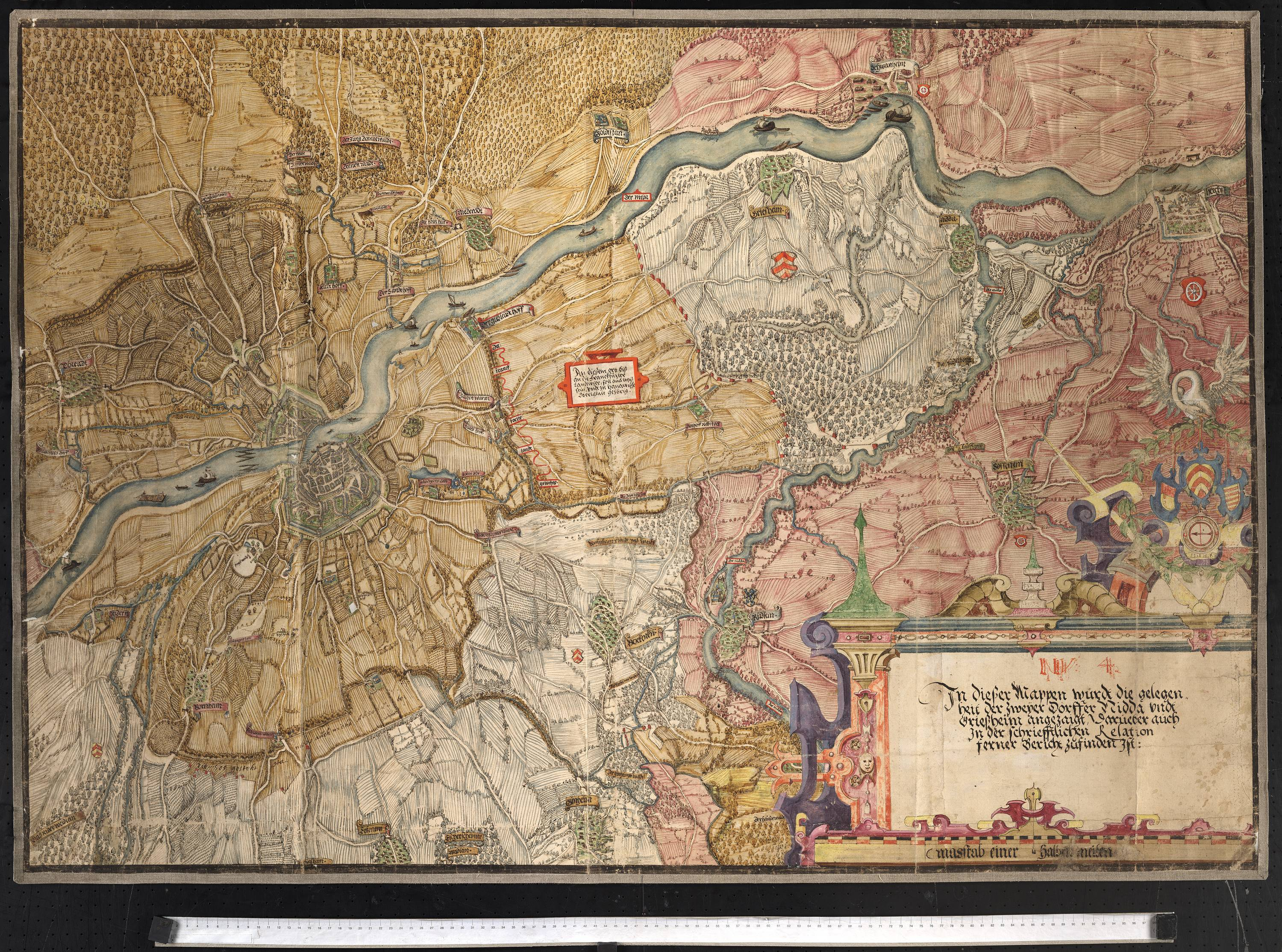 Karte der Dörfer Nied und Griesheim, 1583 (Hessisches Staatsarchiv Marburg Karten Nr. R II 40). Zum Archivale